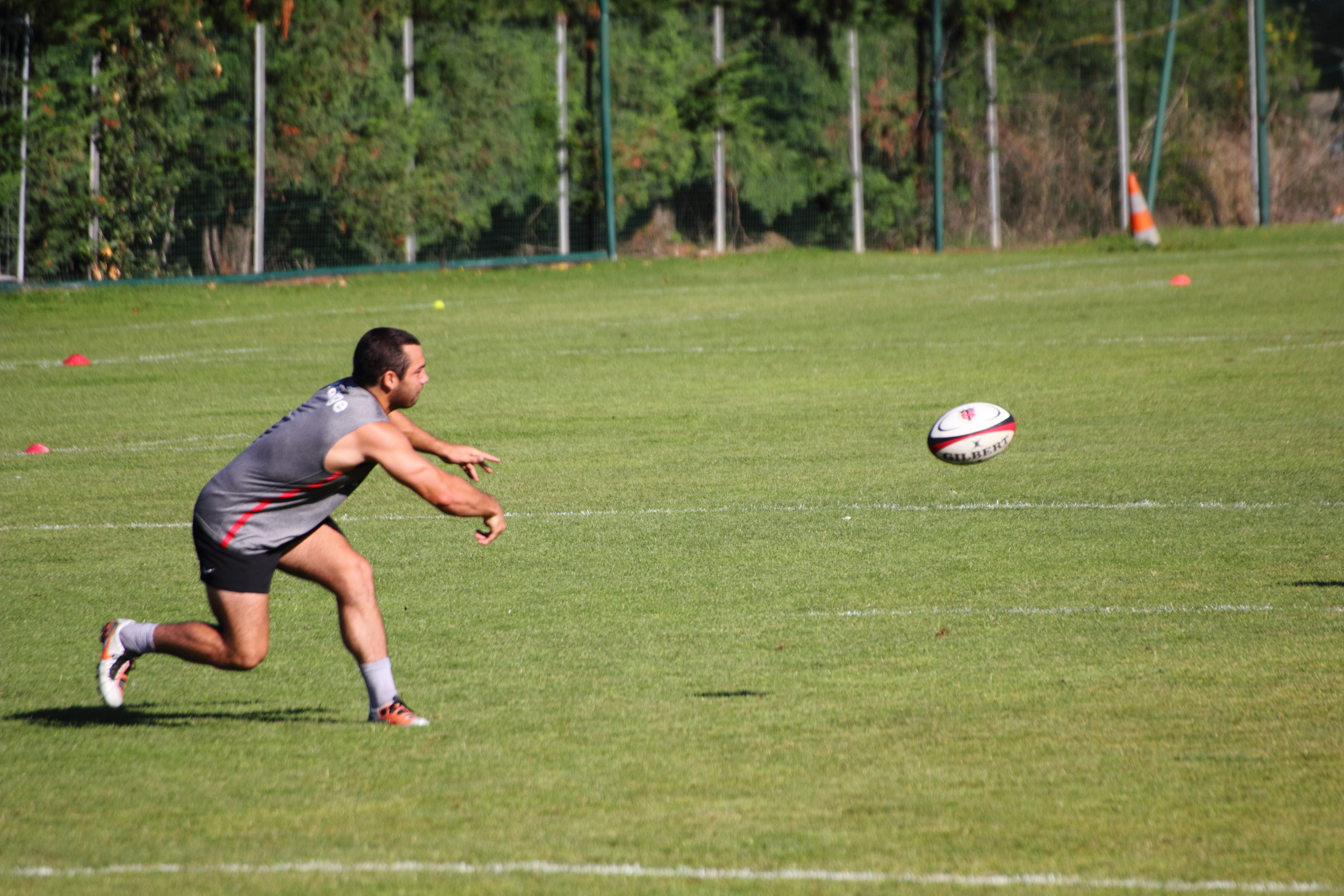 Jean-Marc Doussain lors d'un lancement de jeu à un entrainement du Stade toulousain